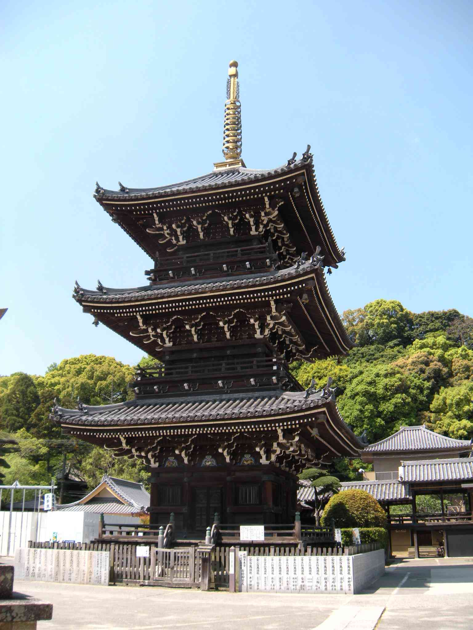 水間寺の三重塔